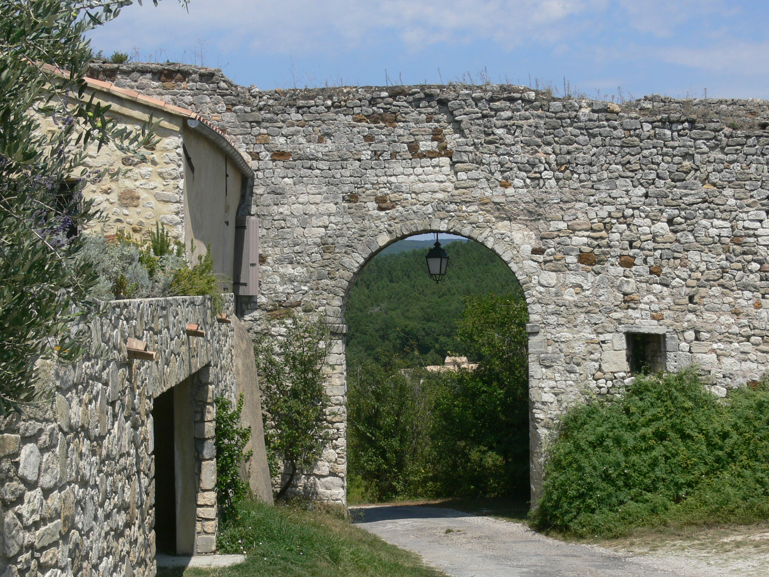 Porte dans le rempart de Valaurie (Drôme), vers le nord